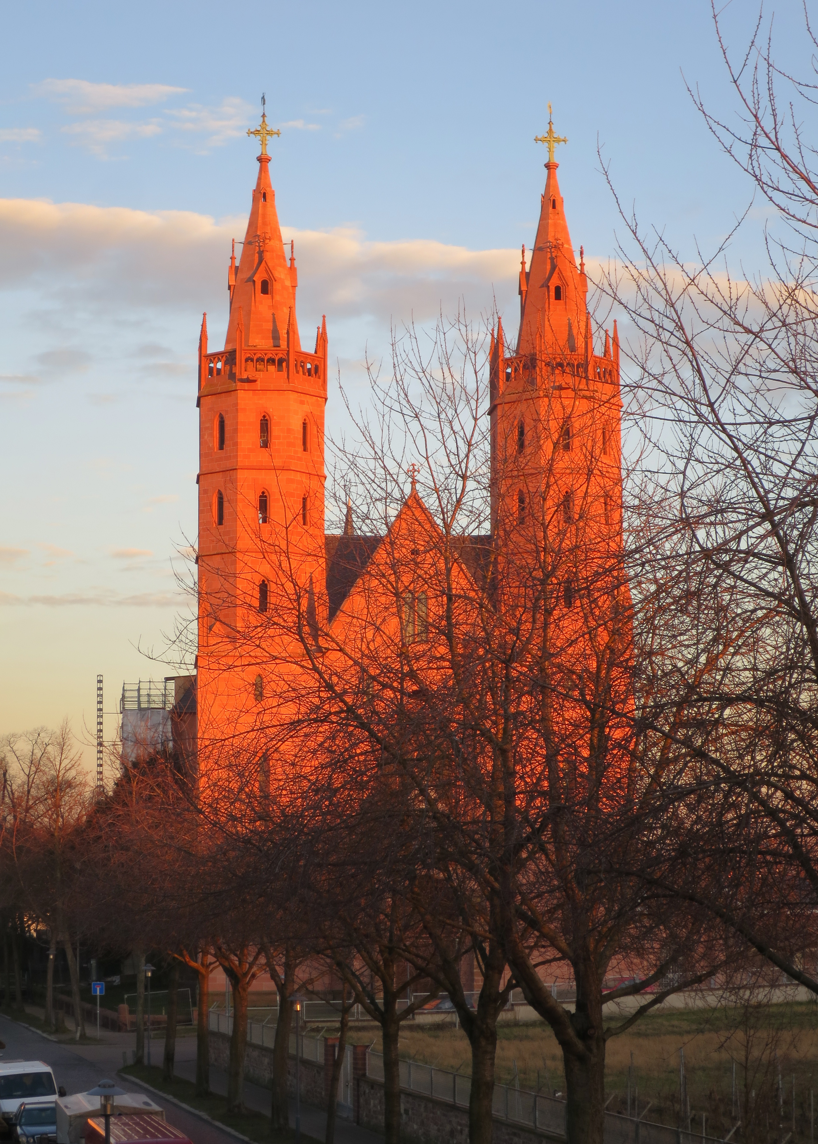 Liebfrauenkirche in Worms in Abendbeleuchtung